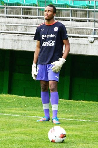 El arquero inglés y chileno Lawrence Vigouroux en la selección Sub-20 de Chile